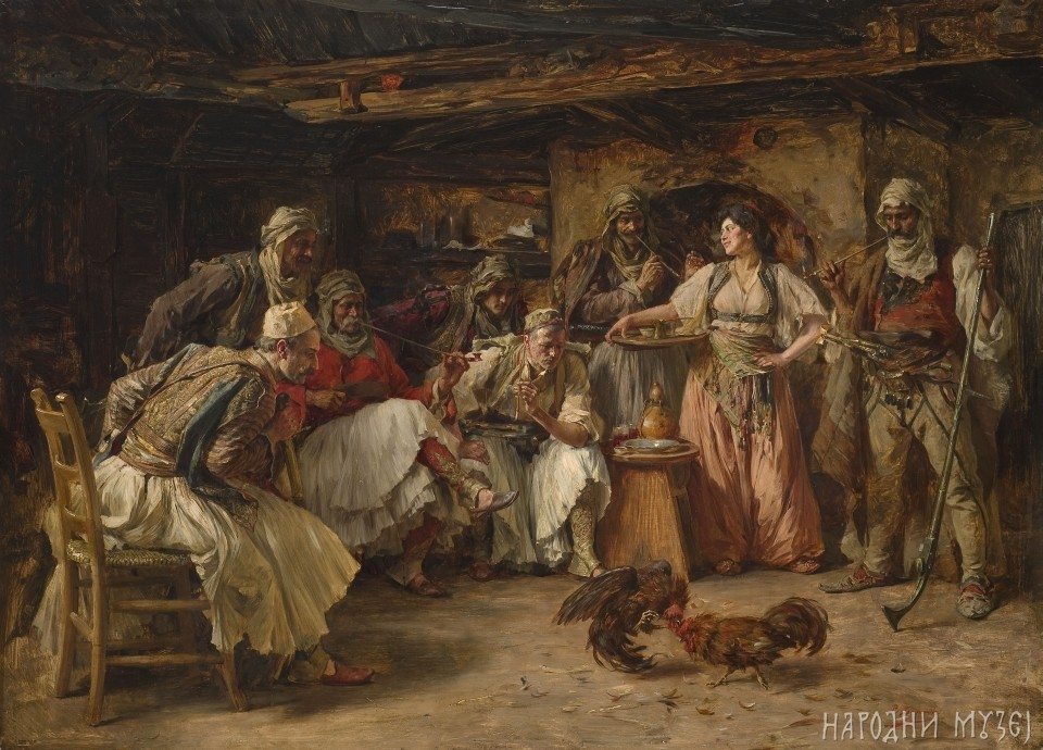 Борба петлова